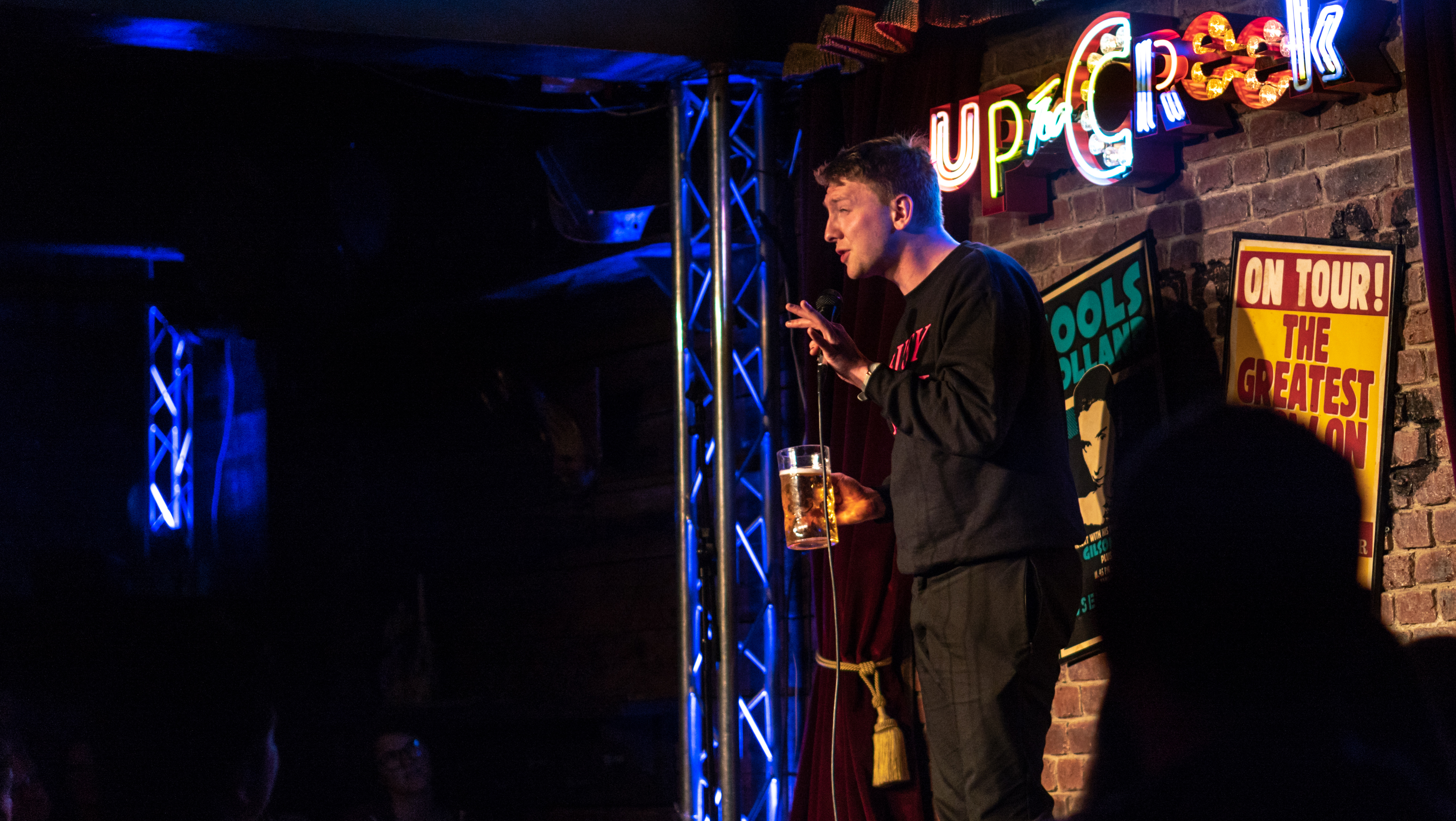 LycettPascoeGreen290518-15